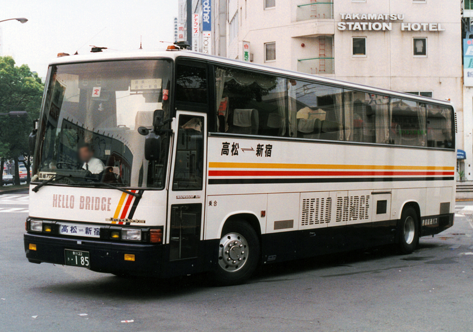 四国高速バス ハローブリッジ 日野ブルーリボングランデッカ P-RU638BB